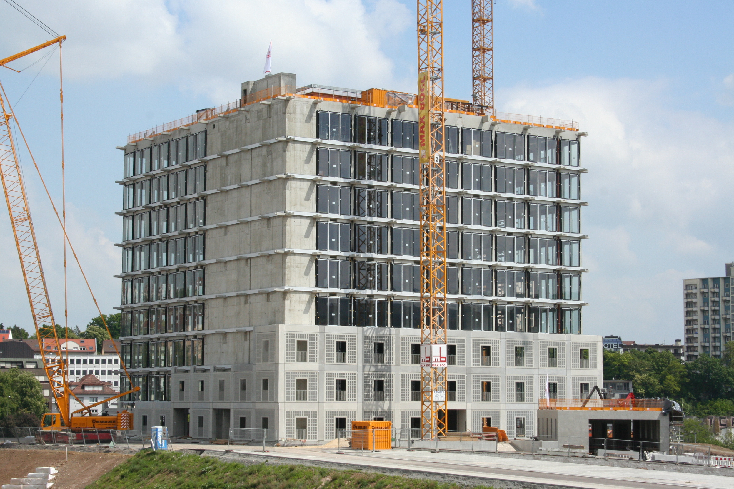 Neubau der Stadtbibliothek Stuttgart (auch Bibliothek 21 genannt) auf dem Stuttgart 21 Areal, zukünftig Mailänder Platz